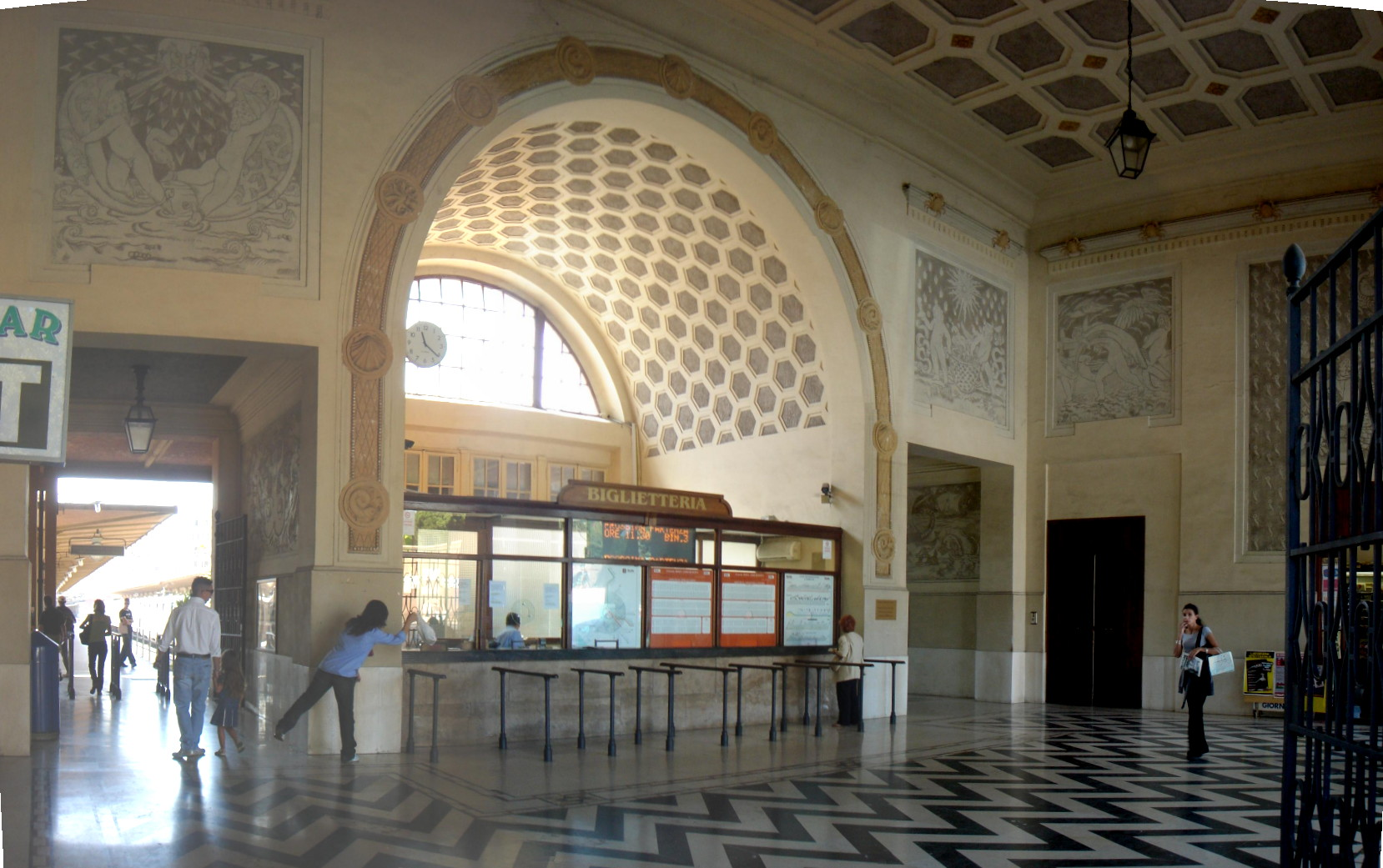 Roma: stazione della ferrovia Roma-Lido, biglietteria